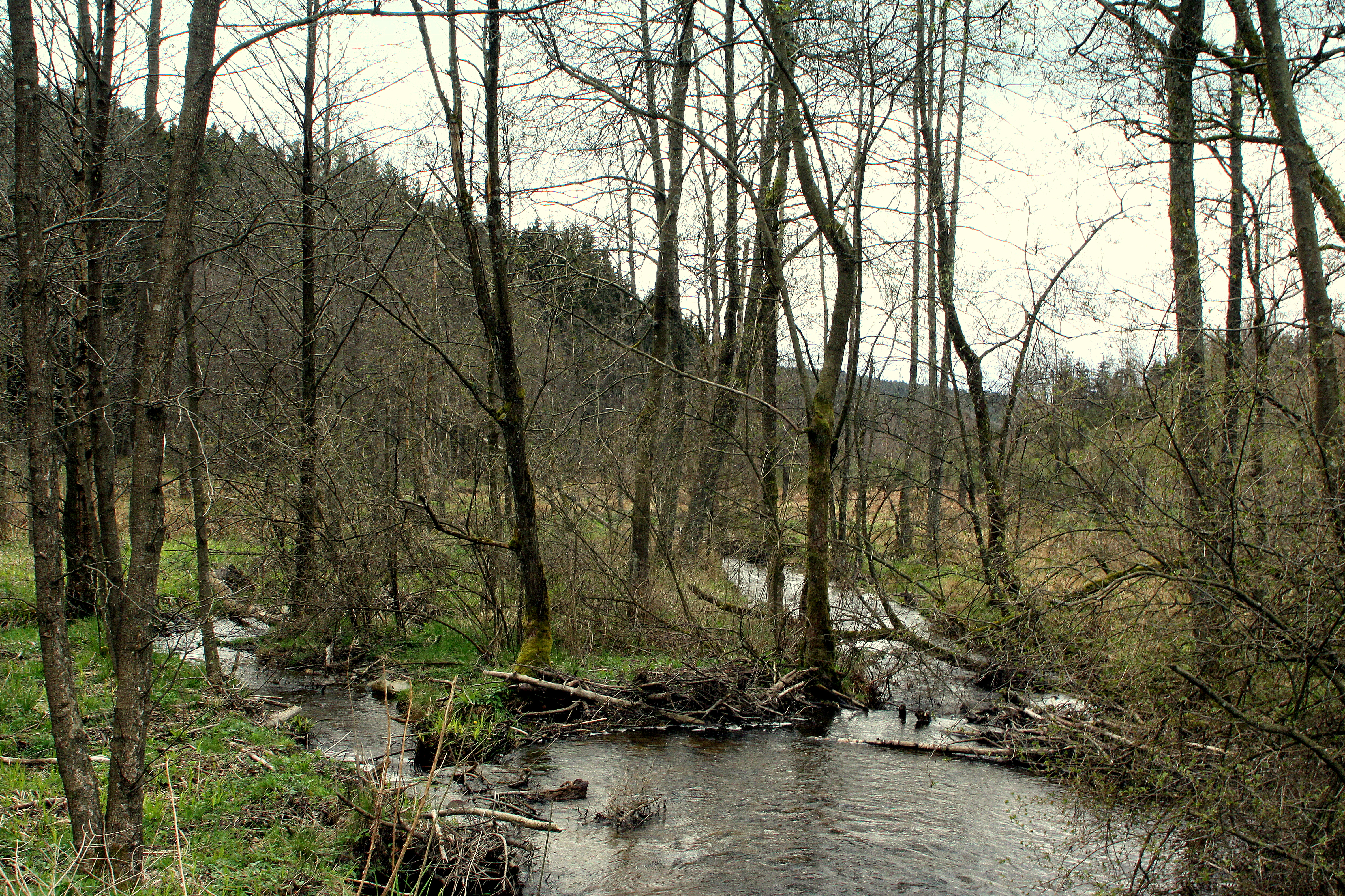 De Ruisseau du pré Lefèbre am Dall tëscht de Bëscher Bois de Wibrin a Bois d'Achouffe